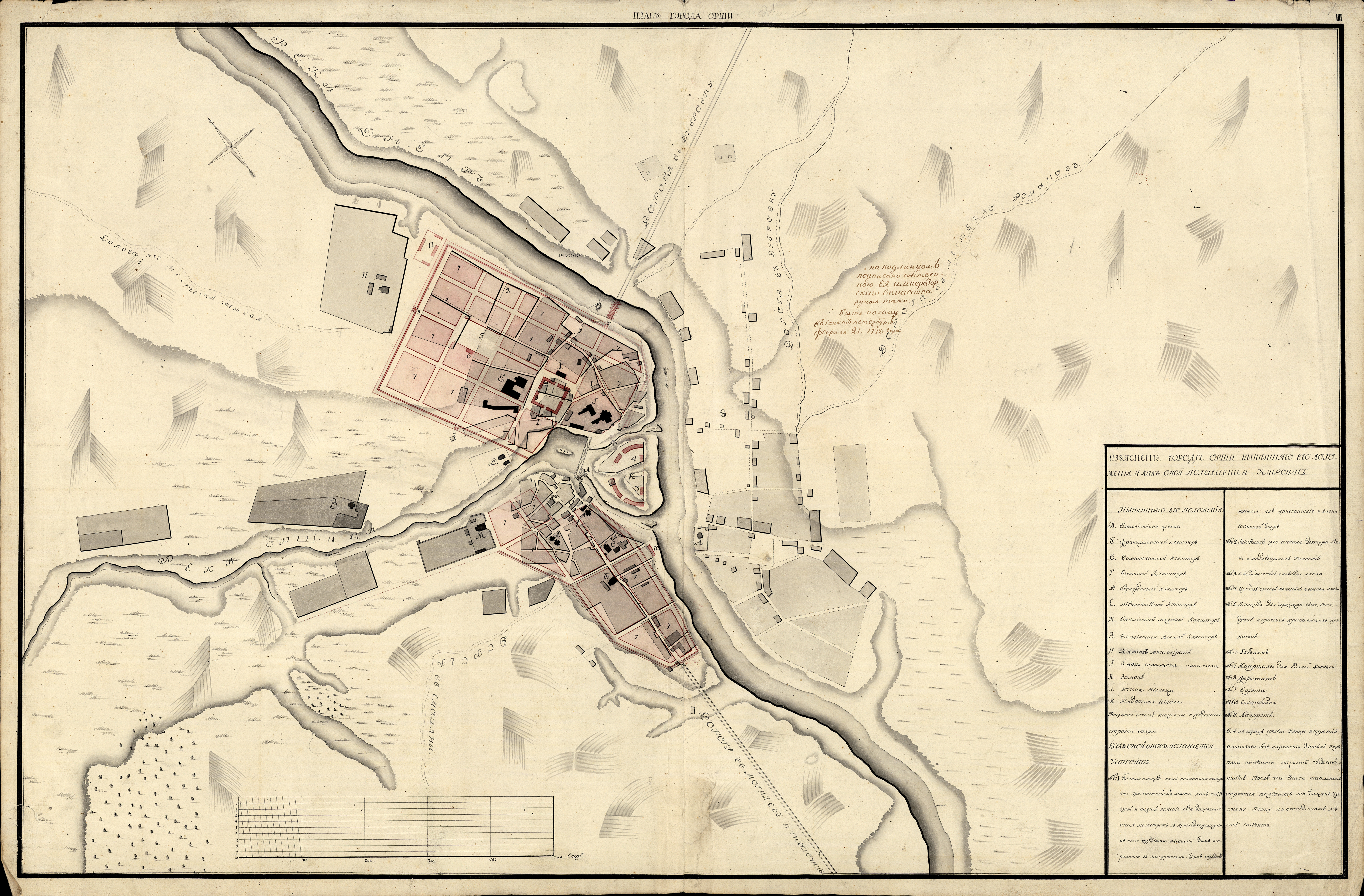 Беларуская (тарашкевіца): Ворша (Vorša). Плян места, праект